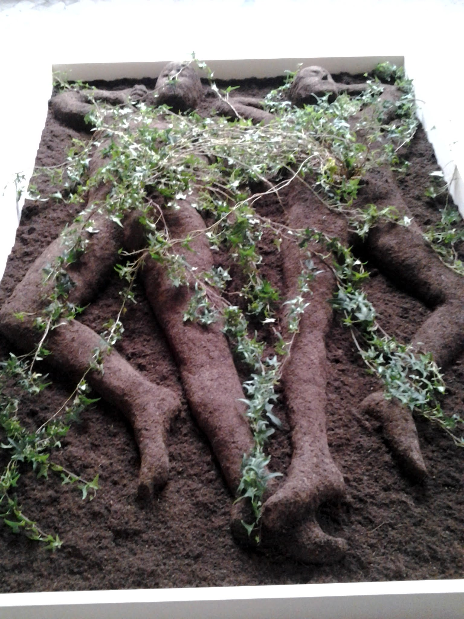 Chiesa di Sant'Ambrogio della Vittoria e annessa ex abbazia cistercense This is a photo of a monument which is part of cultural heritage of Italy.